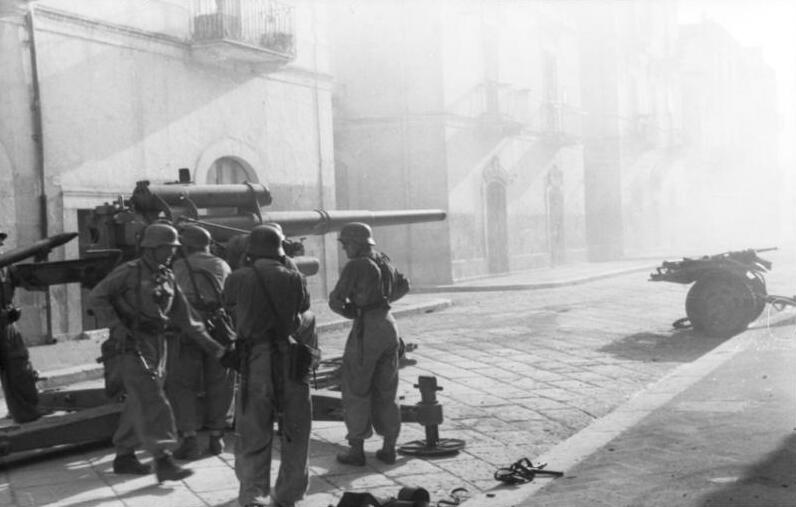 Text Scherl: Bei ihrem Vorgehen gegen die Truppen des Verrätermarschalls Badoglio und die mit diesem zusammenarbeiteneden kommunistischen Banden hatten unsere Fallschirmjäger oft in kleinen süditalienischen Städten heftige Kämpfe mit den in den Häusern verbarrikadierten Heckenschützen zu bestehen. Hier ist ein schweres Flakgeschütz in den Strassen eines Städtchens aufgefahren, um die befestigten Strassensperren niederzukämpfen. PK-Aufnahme Kriegsberichter Reuschle 8.11.1943 5253-43